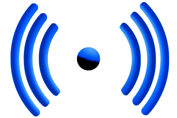 Wifi Signal logo